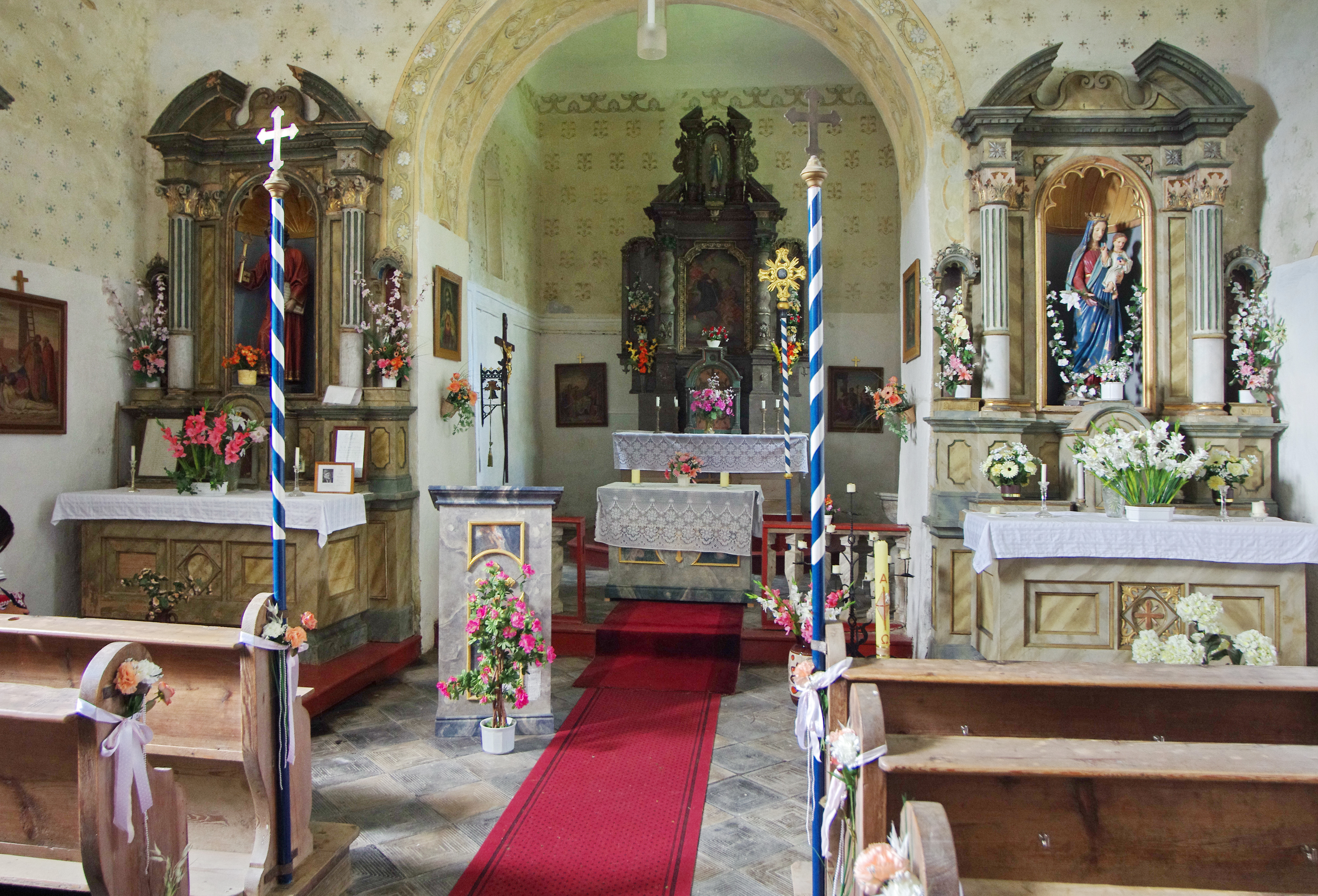 Kostel svatého Jiljí, os. Kámen, Kostelní, Kostelní (Kraslice).